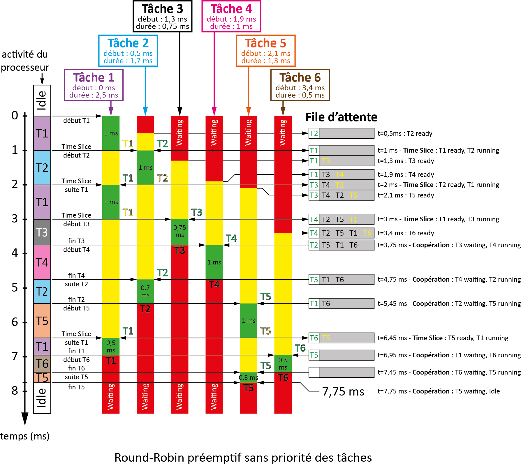 Exemple de fonctionnement d'un ordonnanceur préemptif Round-Robin avec un quantum de temps de 1ms, basé sur l'exemple présenté sur la page wikipédia EN associée. 6 tâches de début et durées d'exécutions différentes sont confiées à l'ordonnanceur pour une exécution multitâche.